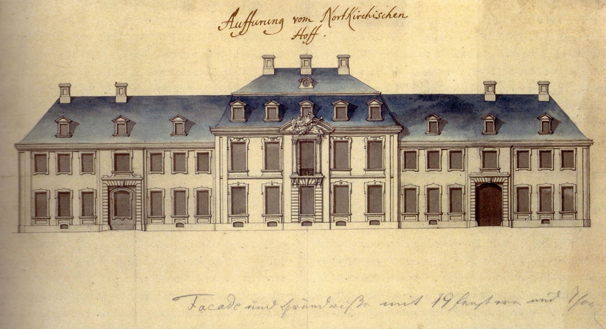 Aufriss des geplanten Nordkirchener Hofs in Münster, Zeichnung im Stadtmuseum Münster